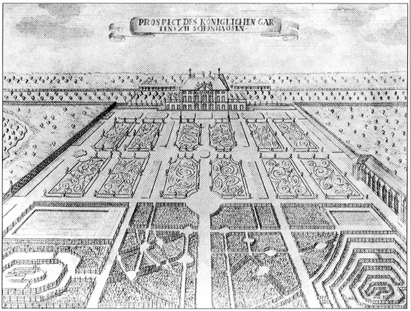 Schönhausen (1711-17, Petzod)